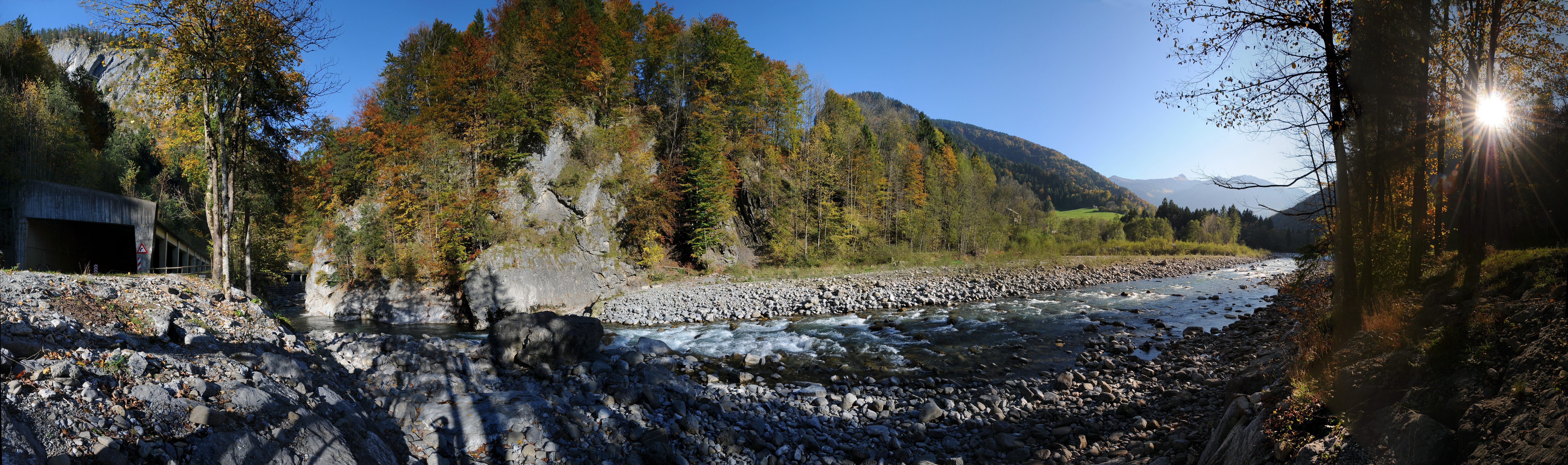 Eine Galerie (Schutzgalerie) ist ein Bauwerk als Einhausung, das einen Verkehrsweg vor Lawinen (Lawinengalerie), Steinschlag (Steinschlaggalerie) oder Muren schützt. Im Panoramabild die Klausgalerie an der Bregenzerwaldstraße (L200) in Mellau. Hier mündet der Dürrenbergbach in die Bregenzer Ache.